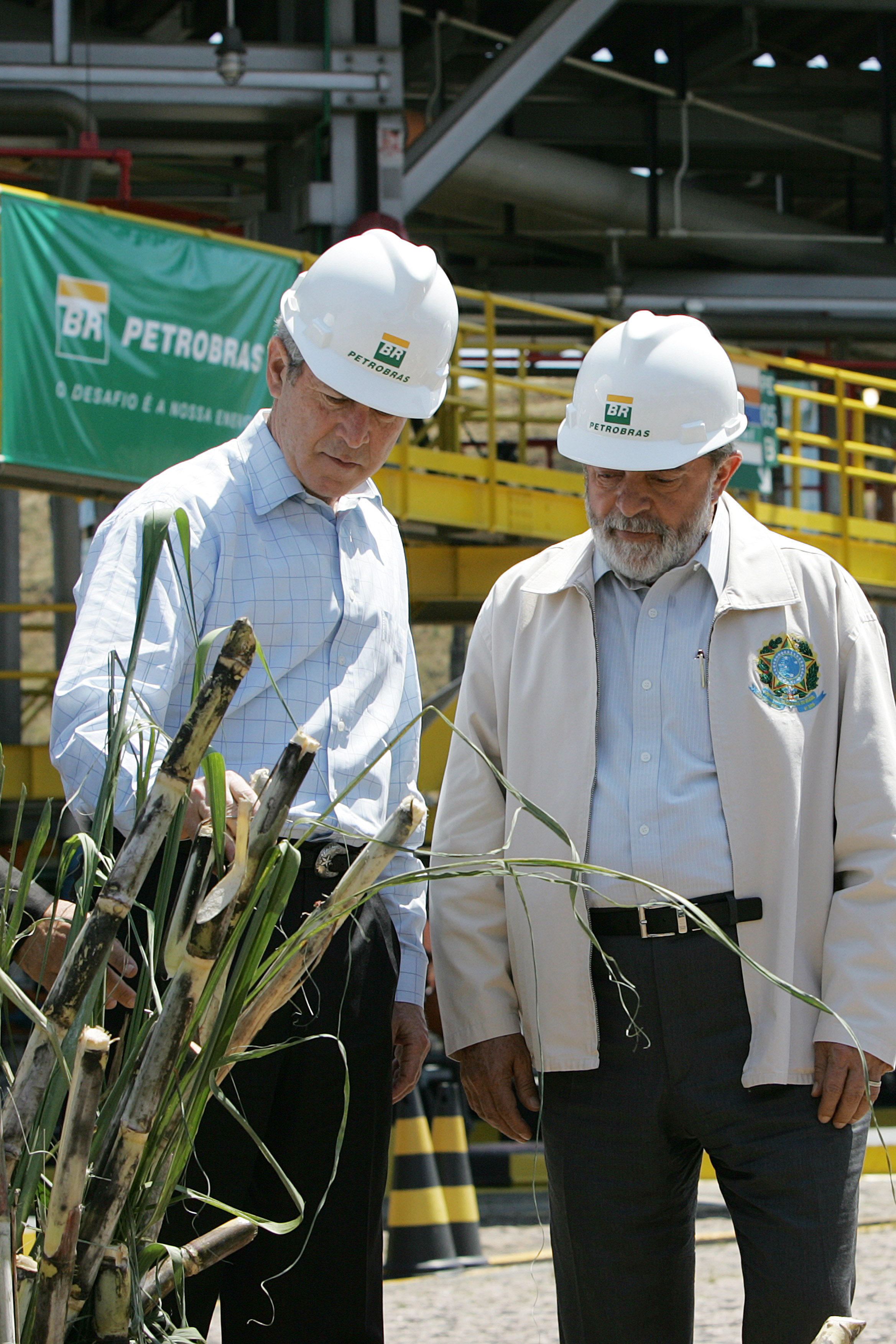 O presidente dos Estados Unidos, George W. Bush, e o presidente do Brasil, Luís Inácio Lula da Silva, ao lado de talos de cana-de-açúcar. .